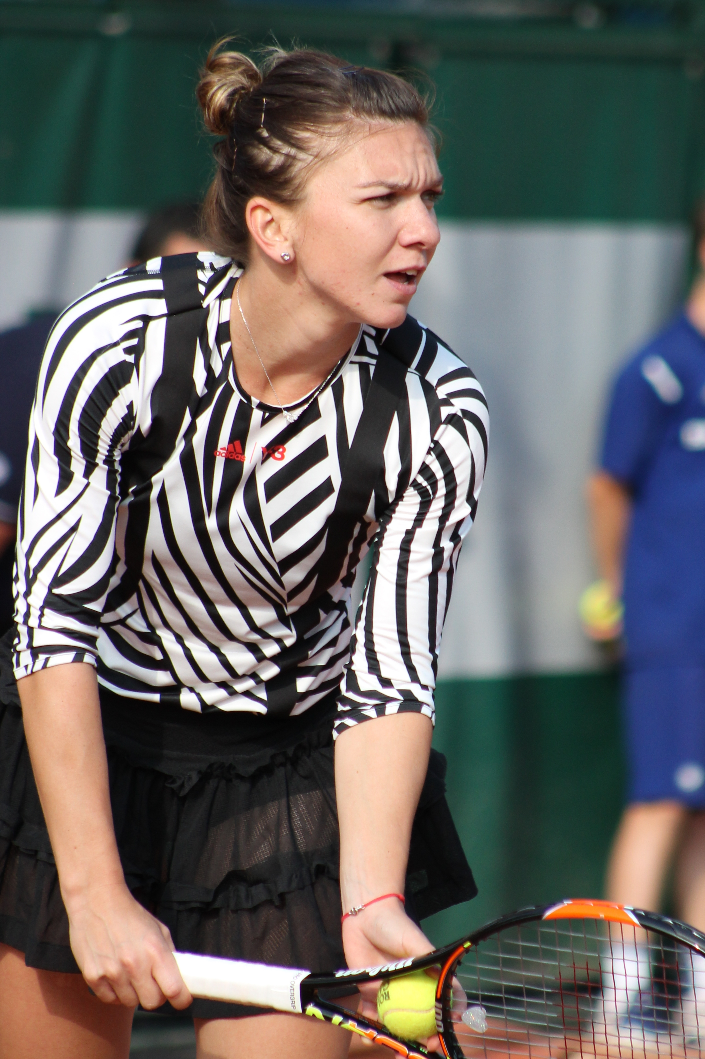 Halep RG16 (20)